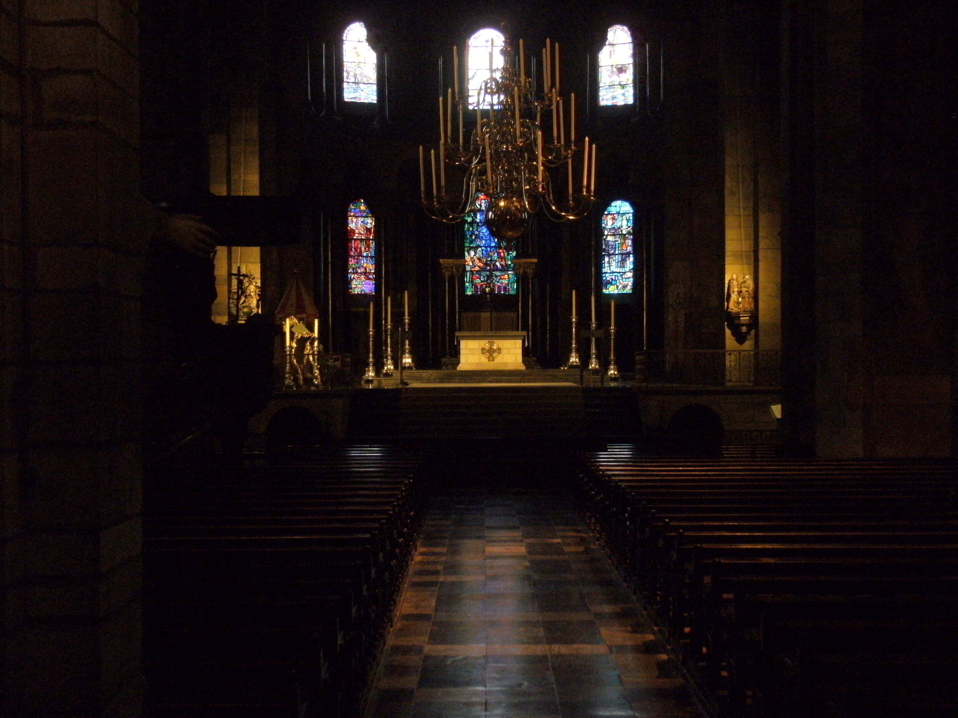 20130313 Onze Lieve Vrouwekerk Maastricht.